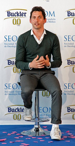 El 25 de abril por la mañana se ha dado a conocer un interesante proyecto solidario: «Motivos para celebrar», donde Paco León colaborará con Buckler 0,0 y SEOM (Sociedad Española de Oncología Médica) creando un cortometraje de ficción para apoyar la causa.